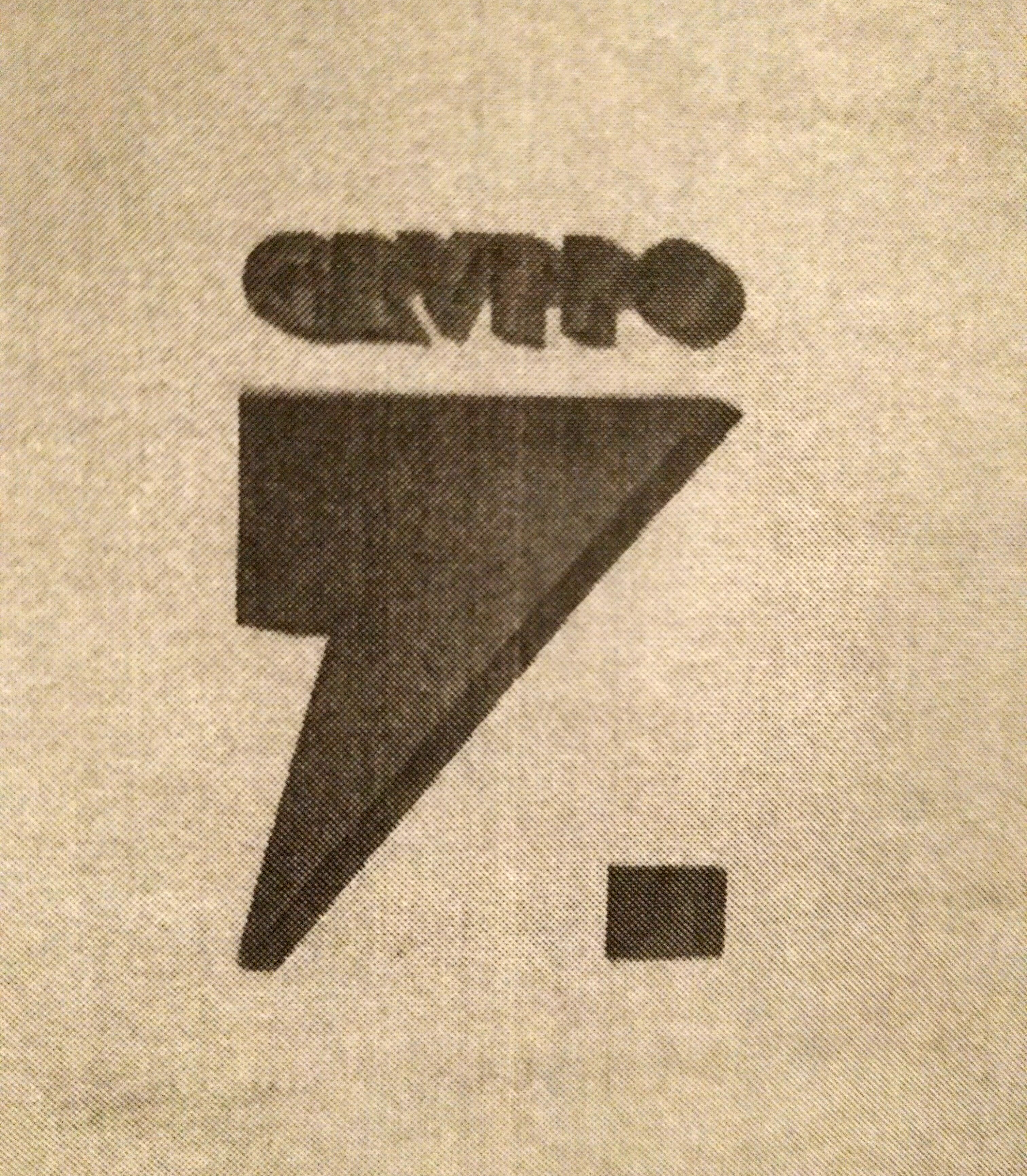 Il logo del Gruppo 7 come compariva sulla carta da lettere intestata, accanto all'indirizzo Via Vivaio 22